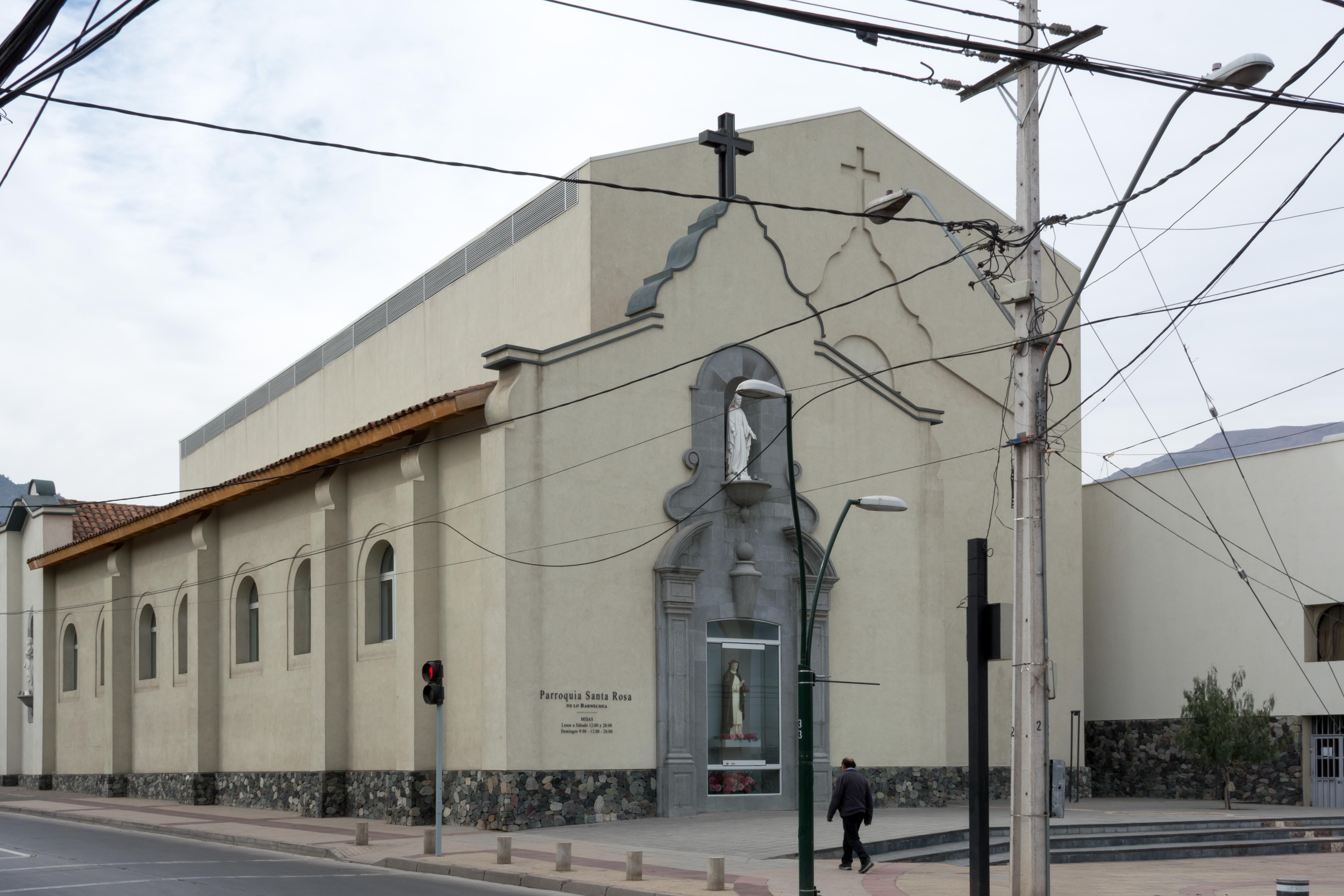 Iglesia de Santa Rosa, Lo Barnechea, Santiago, Región Metropolitana, Chile.